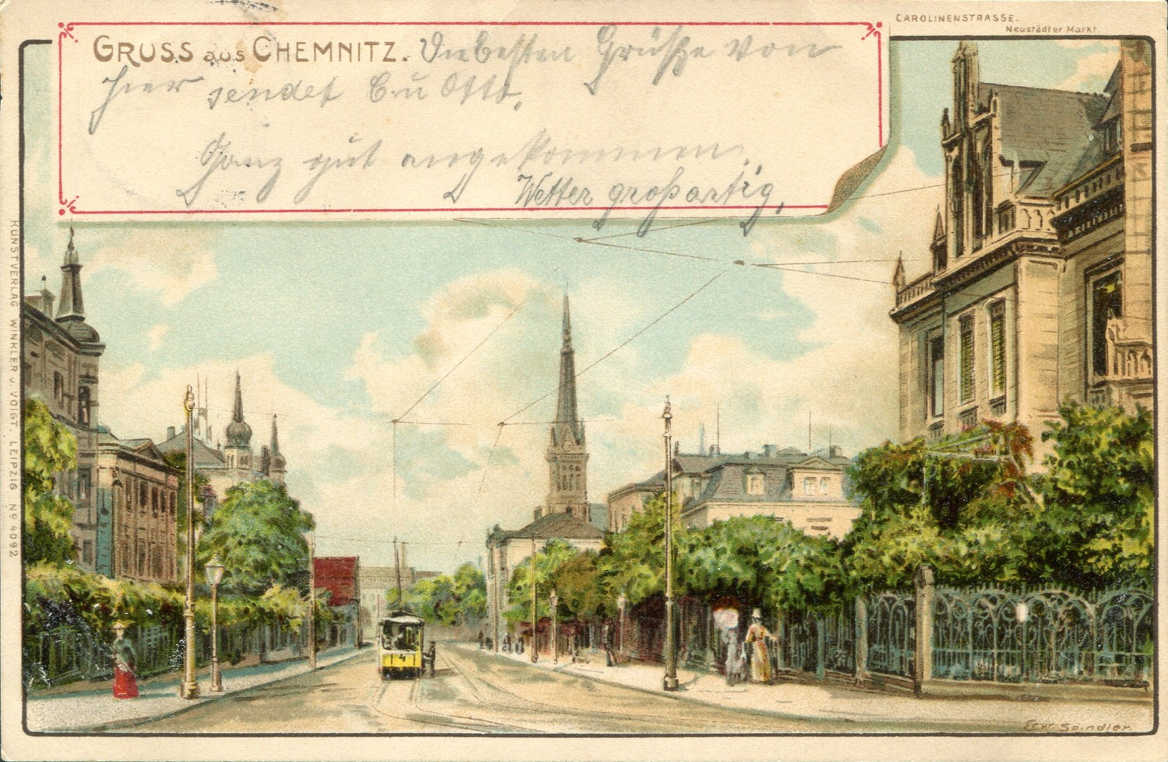 Titel: Gruss aus CHEMNITZ, CAROLINENSTRASSE Neustädter Markt; Kartennummer: 4092; Signatur: Erw.Spindler; Signaturlage: rechts unten